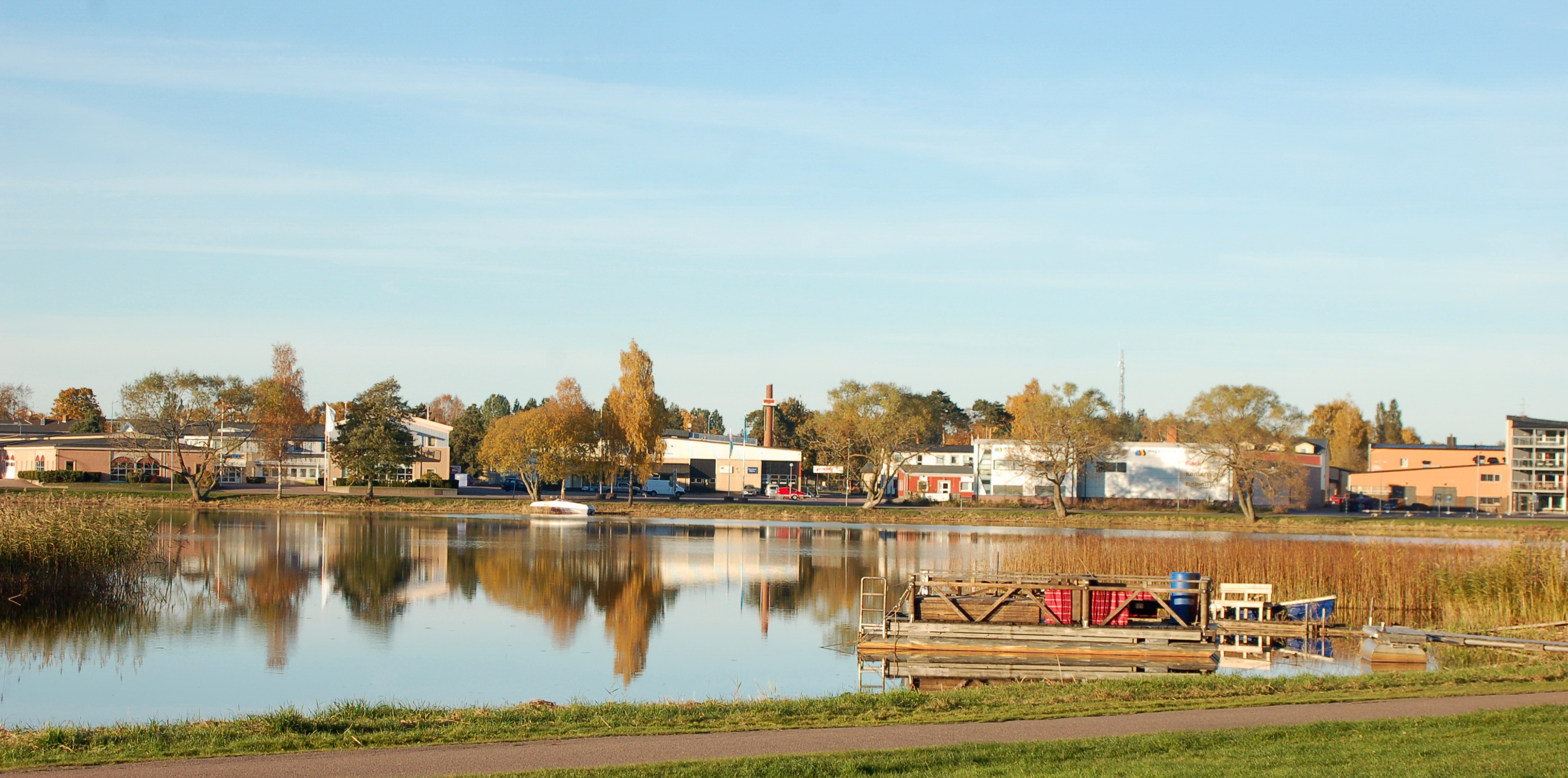 Lambergstjärnet Lamberget,Karlstad.